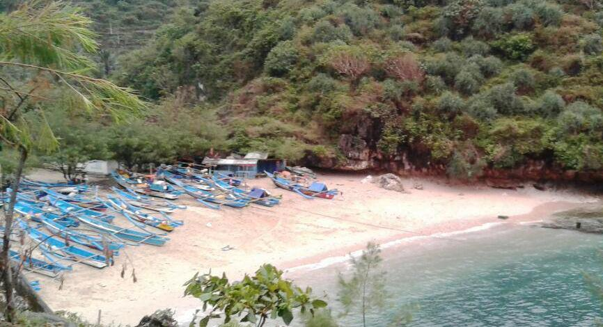 Pantai Gesing merupakan salah satu objek wisata di Kabupaten Gunungkidul, Daerah Istimewa Yogyakarta.